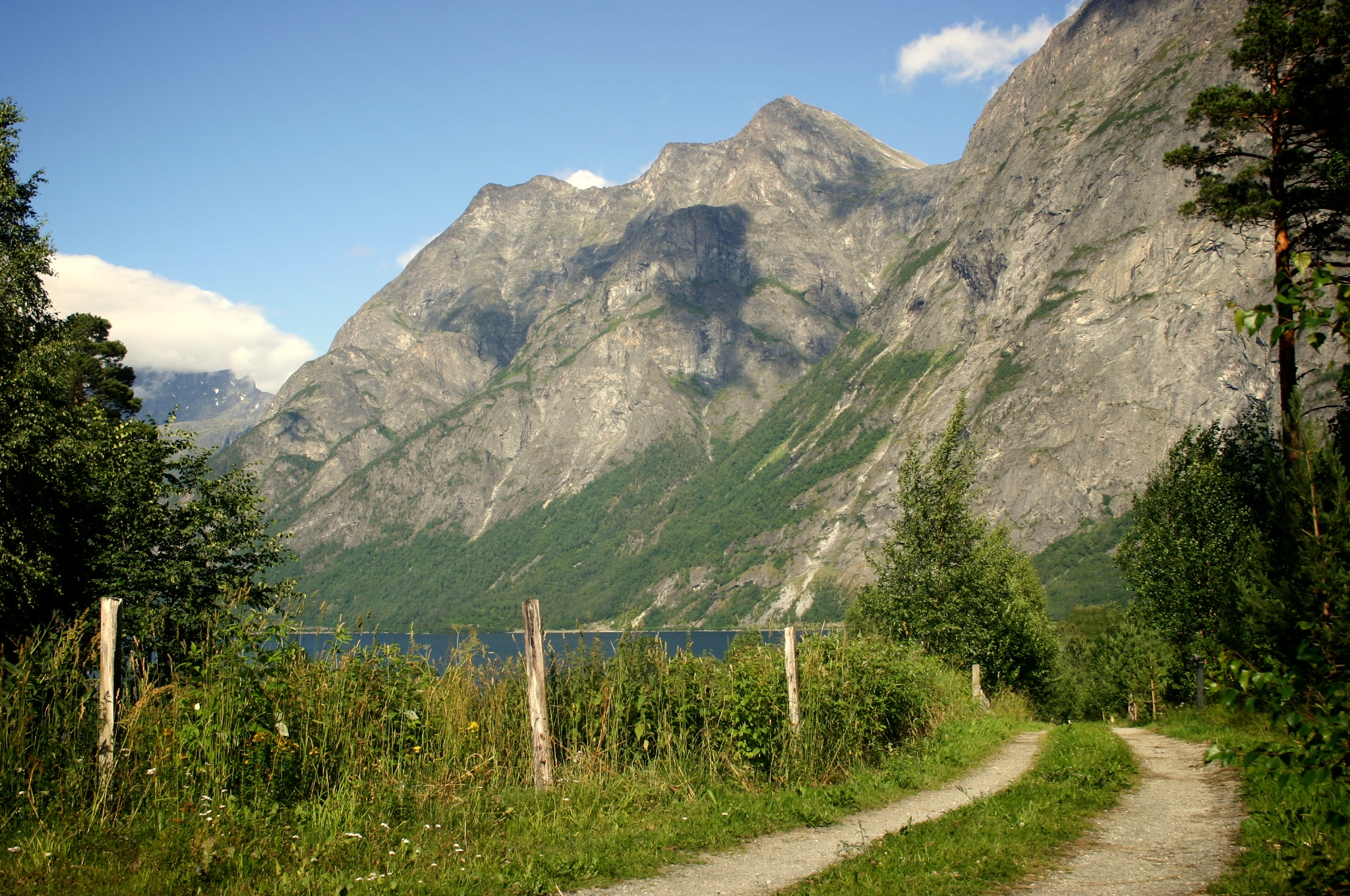 Eikesdal